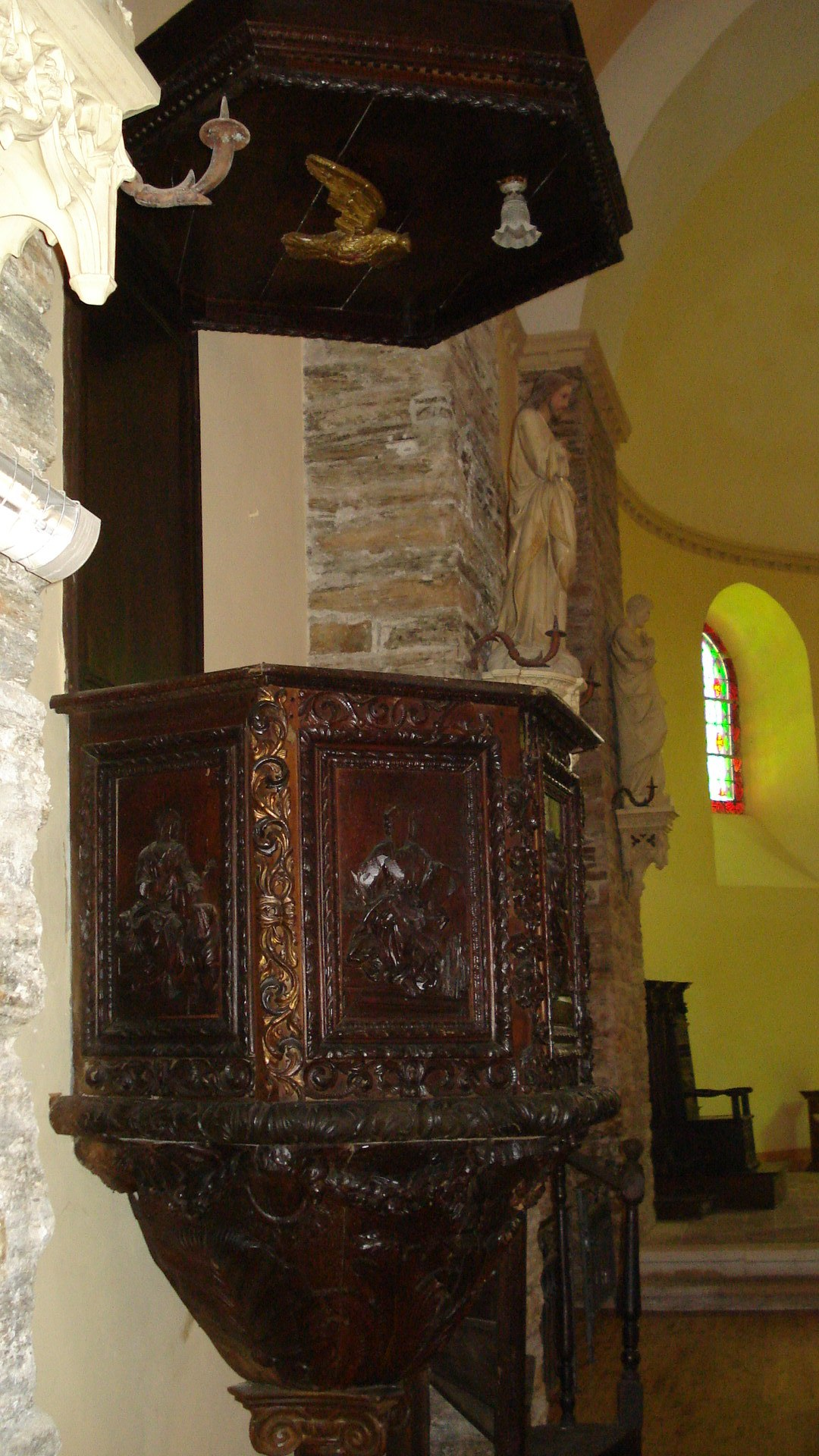 Chaire de l'église de Saint Germain de Calberte Lozère